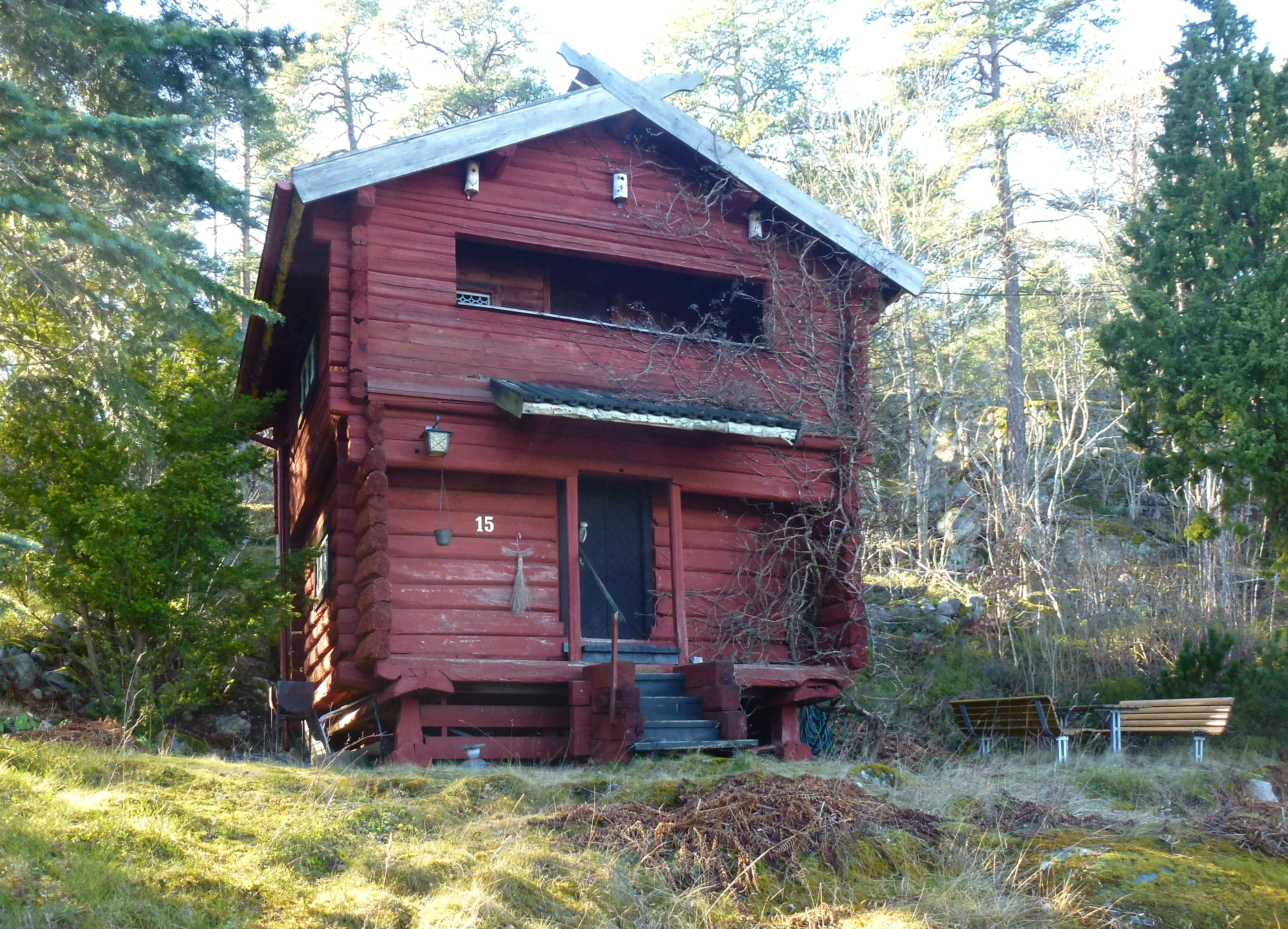 Grönstakolonin på Lidingö